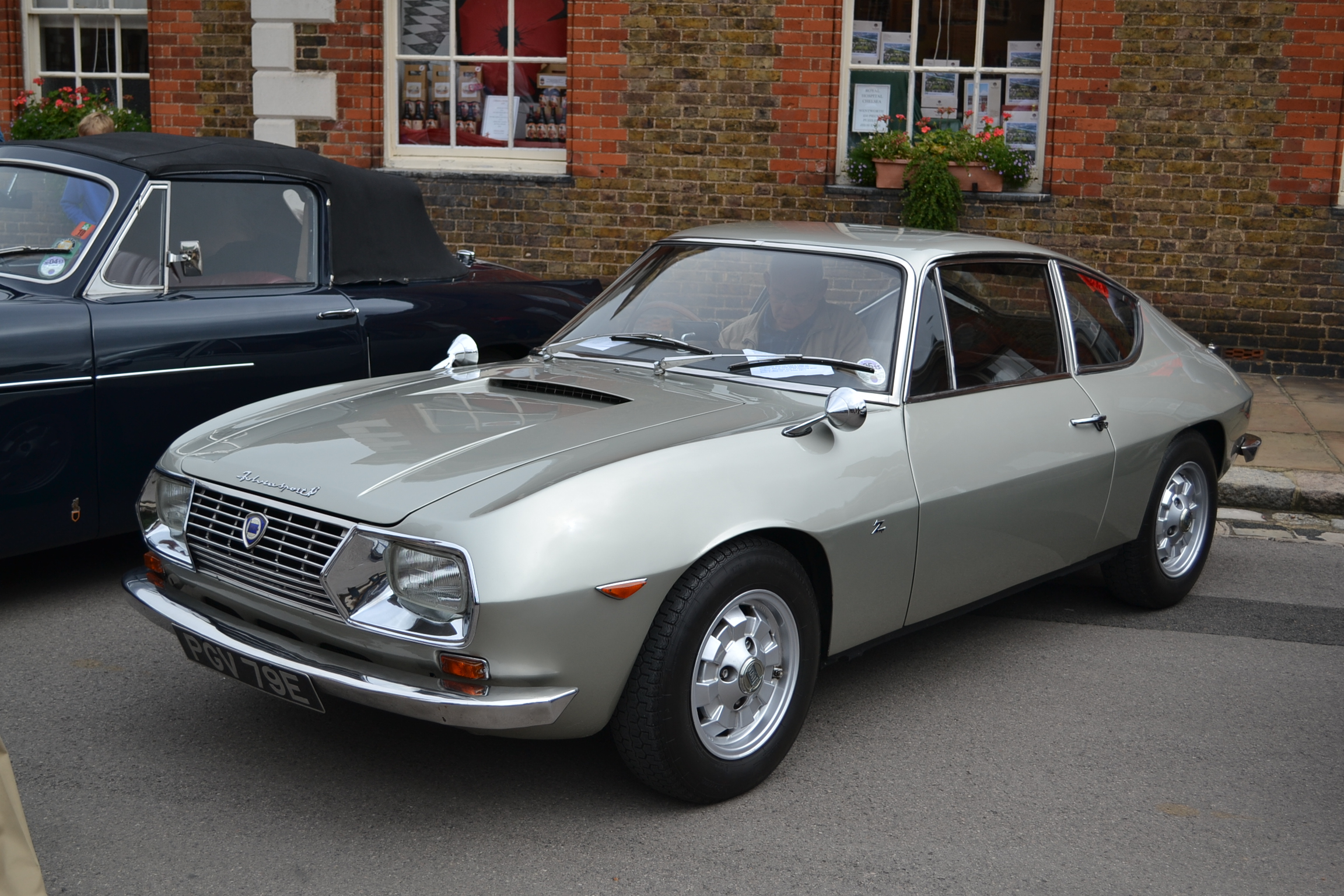 Lancia Fulvia Sport Zagota - Chelsea Auto Legends 2012